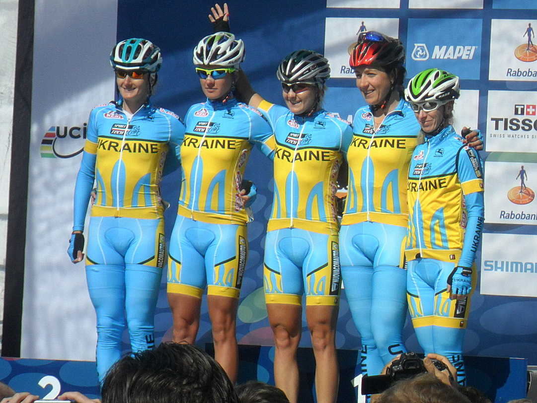 Ploegenpresentatie Oekraïne voor de start van het Wereldkampioenschap 2012 in Valkenburg, Nederland.